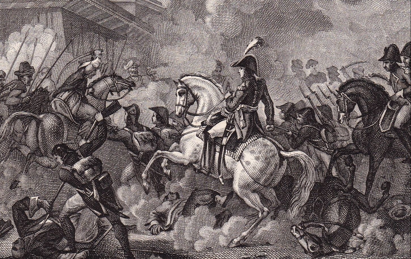 Gravure du XIXe siècle de François Louis Couché (1782-1849) représentant le maréchal Davout en Égypte.